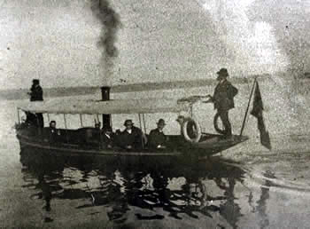 die St. Urs auf dem Bielersee